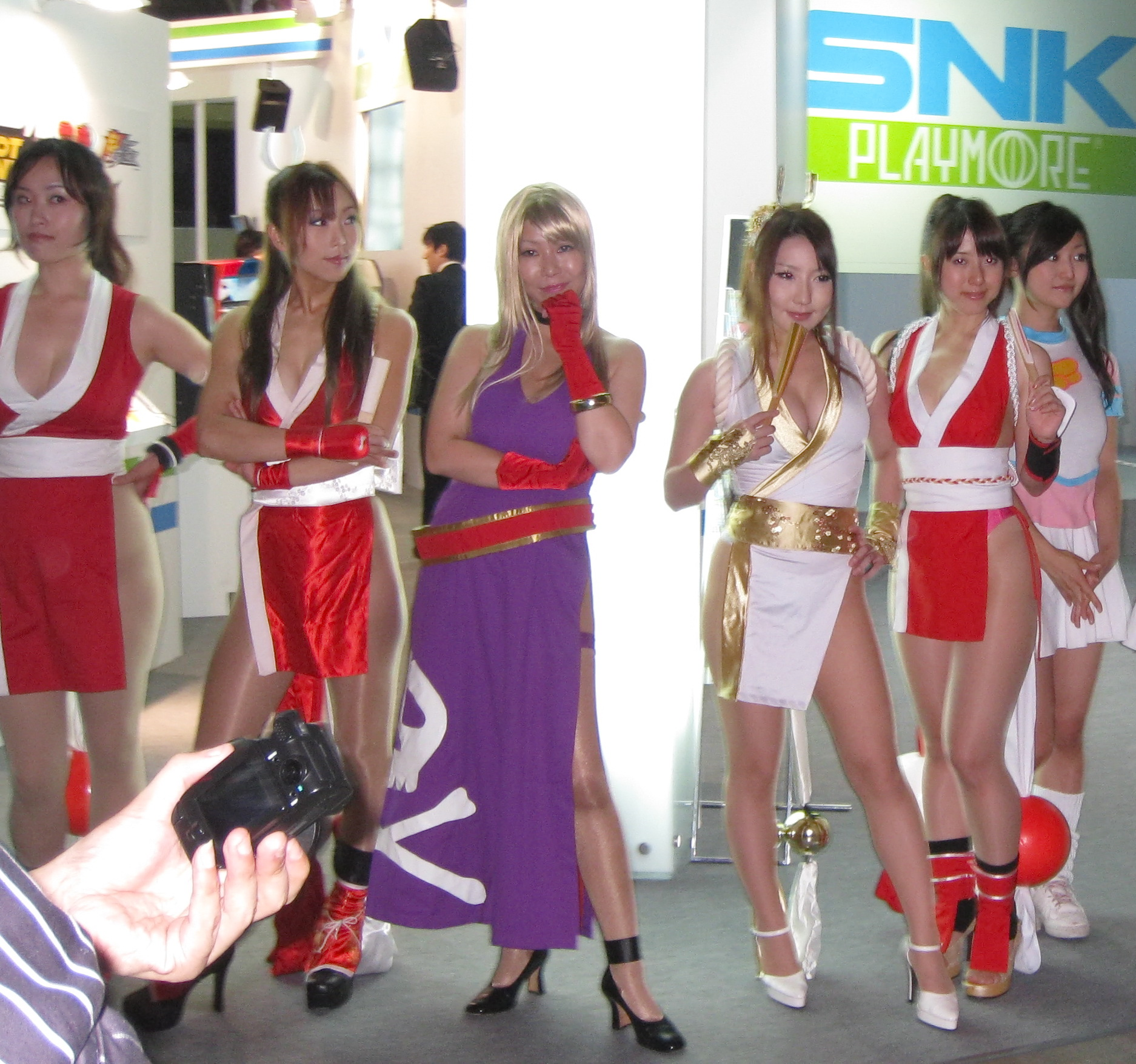 2007東京電玩展，SNK Playmore攤位的宣傳模特兒。